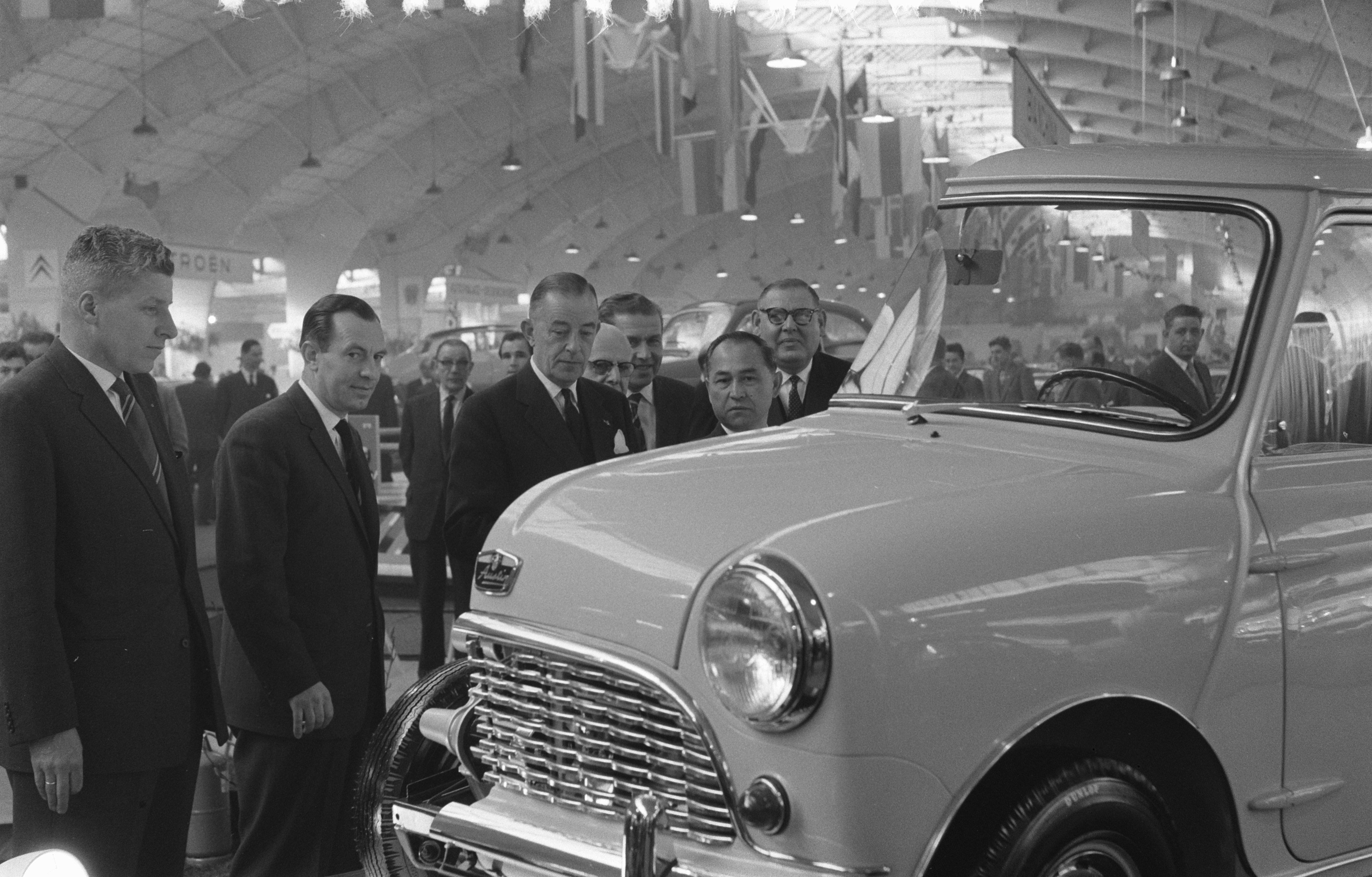 Collectie / Archief : Fotocollectie Anefo Reportage / Serie : [ onbekend ] Beschrijving : Opening van de 42ste RAI door de Secretaris Generaal van Verkeer en Waterstaat mr. A. H. C. Gieben , rondgang over de Datum : 18 februari 1960 Trefwoorden : Openingen, Secretarissen Generaal, tentoonstellingen Persoonsnaam : Gieben, A.H.C. Fotograaf : Pot, Harry / Anefo Auteursrechthebbende : Nationaal Archief Materiaalsoort : Negatief (zwart/wit) Nummer archiefinventaris : bekijk toegang 2.24.01.05 Bestanddeelnummer : 911-0408